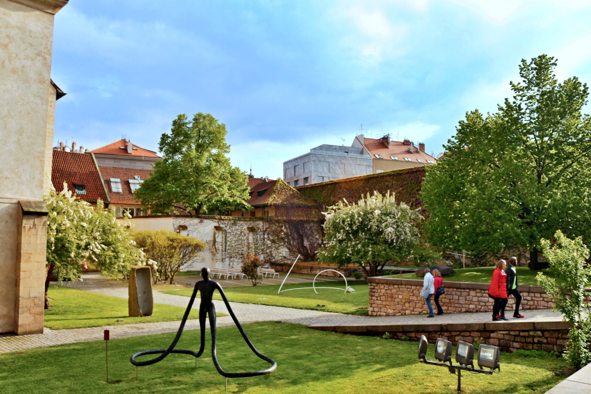 Anežský klášter